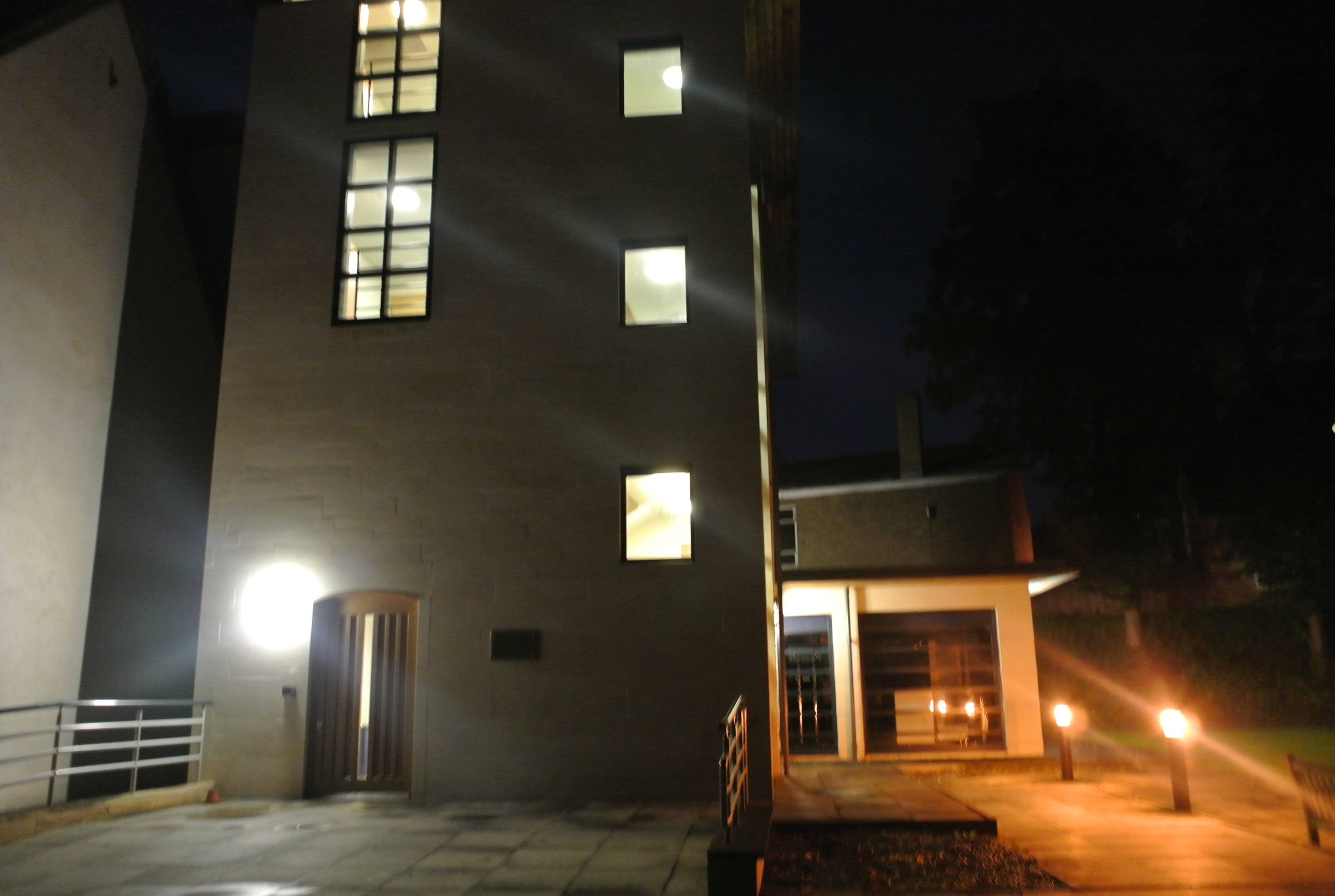 オックスフォード大学マンスフィールドカレッジ内の関東学院大学の研究センター